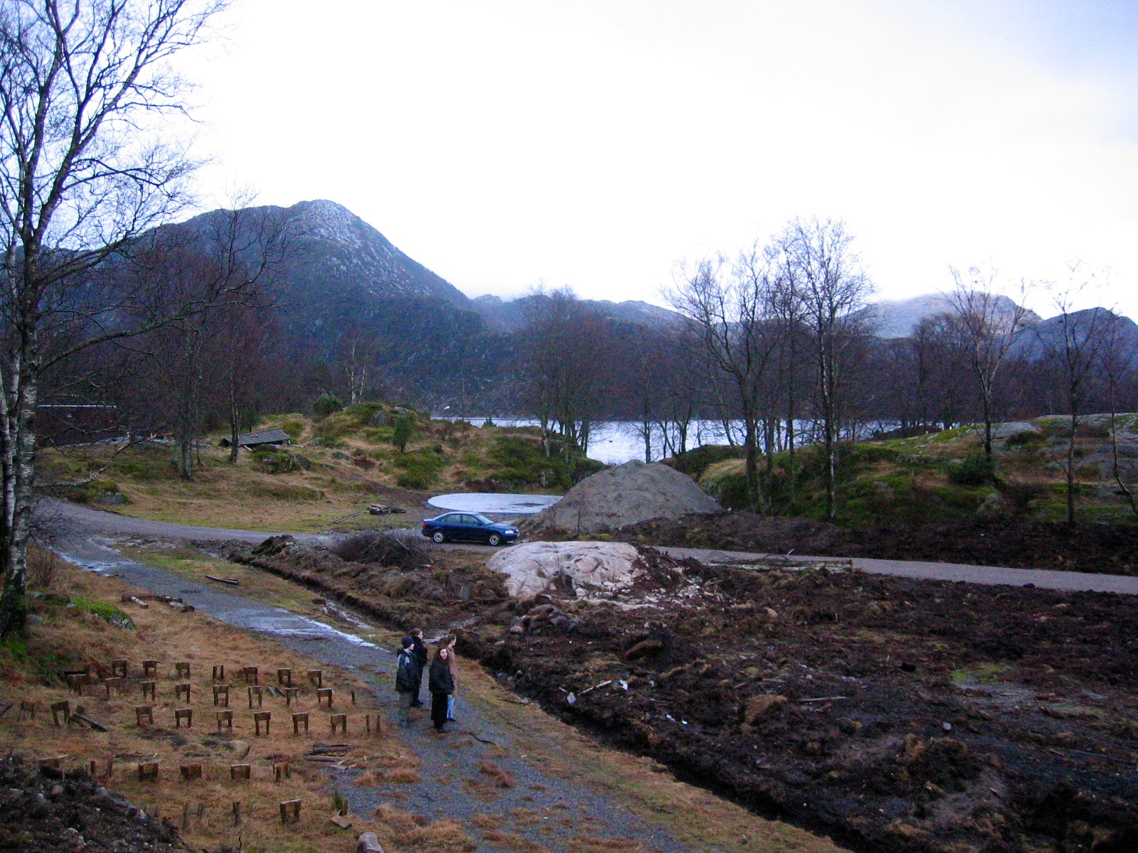 Flolid